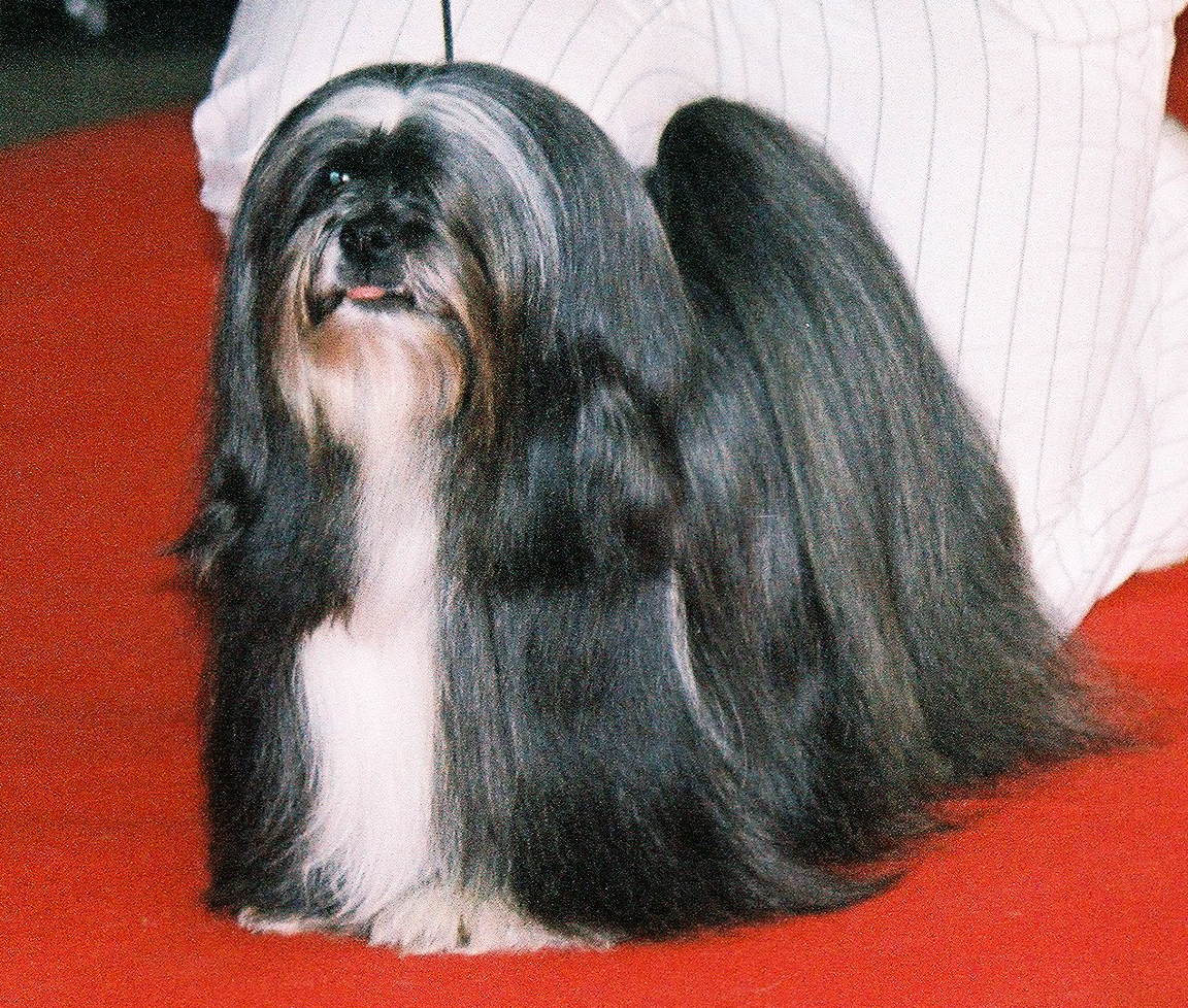 autor: Pleple2000 10:26, 5 April 2006 (UTC)